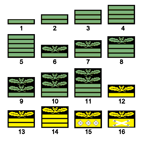 Insignes de grades de la Wehrmacht/ Waffen-SS pour effets sans pattes d'épaules